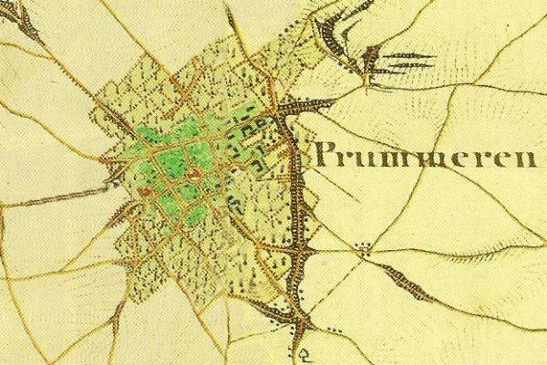 Preußische Kartenaufnahme 1846 - Uraufnahme - (5002 Geilenkirchen)